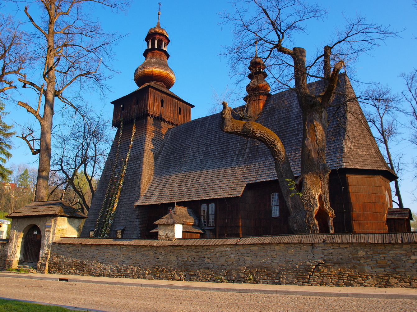 kościół p.w. św. Marii Magdaleny, drewniany obecnie Muzeum Orkana, ogrodzenie z bramkami, otoczenie, drzewostan